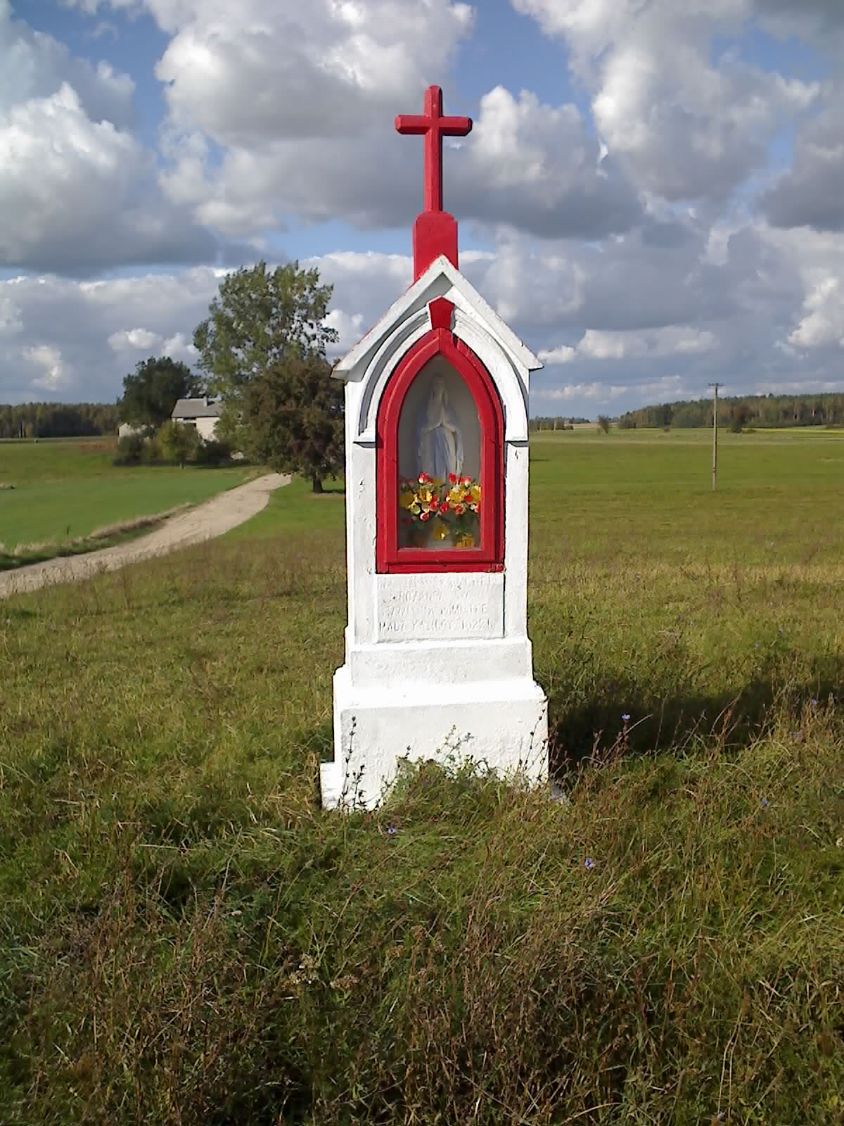 Kapliczka w Kaliskach, od strony Przesmyk